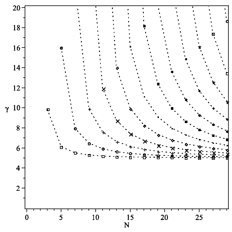 Methode_PN_milieu_semi-infini